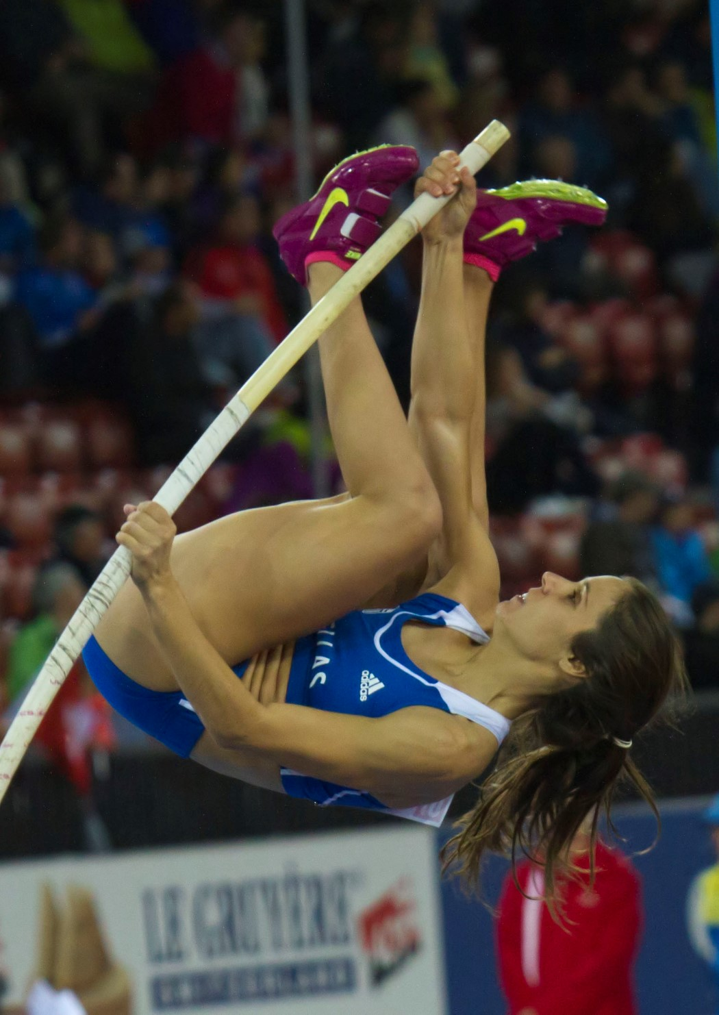 9074 stefanidi